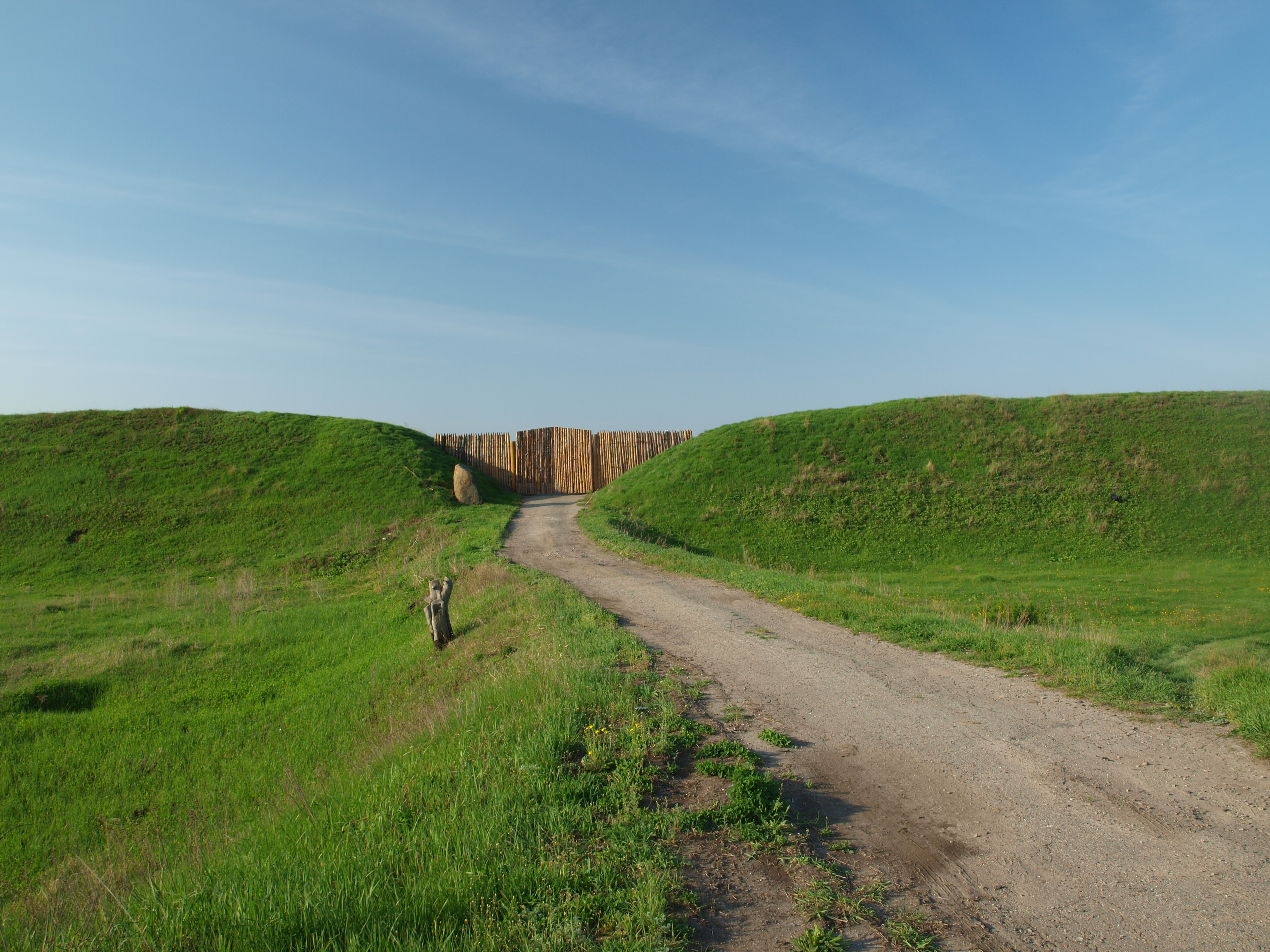 Вхід в фортецю